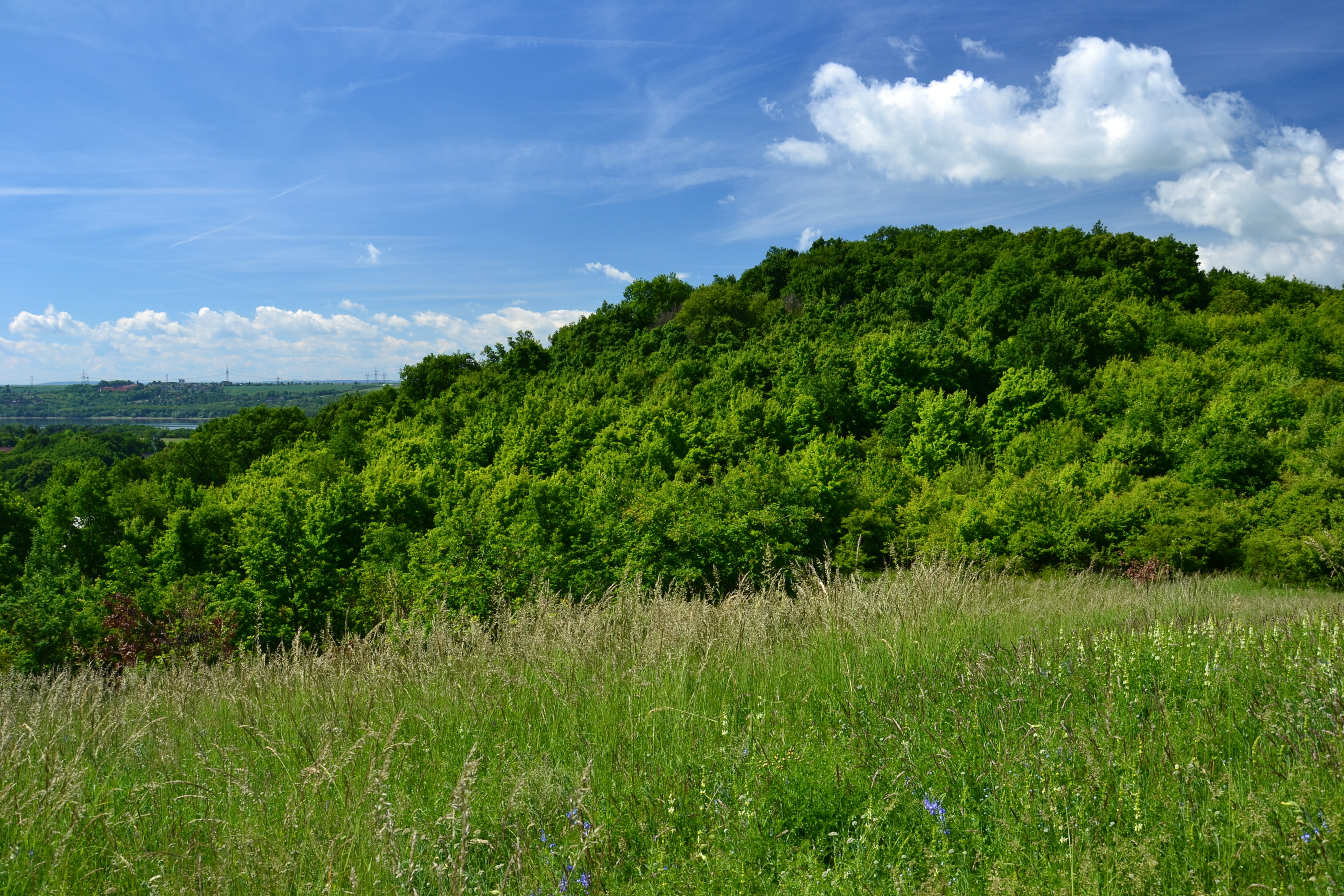 Běšický chochol